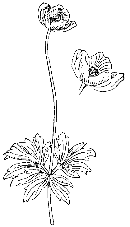 Sl. 23. Hostna véternica. (Anemóne silvéstris.)